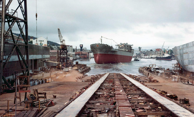 Stabelavløpning: Slik så Solheimsviken ut på 60-tallet. Mye har forandret seg siden den gang. Bergen Mekaniske Verksted var en av Bergens største bedrifter med rundt 1200 ansatte på det meste.